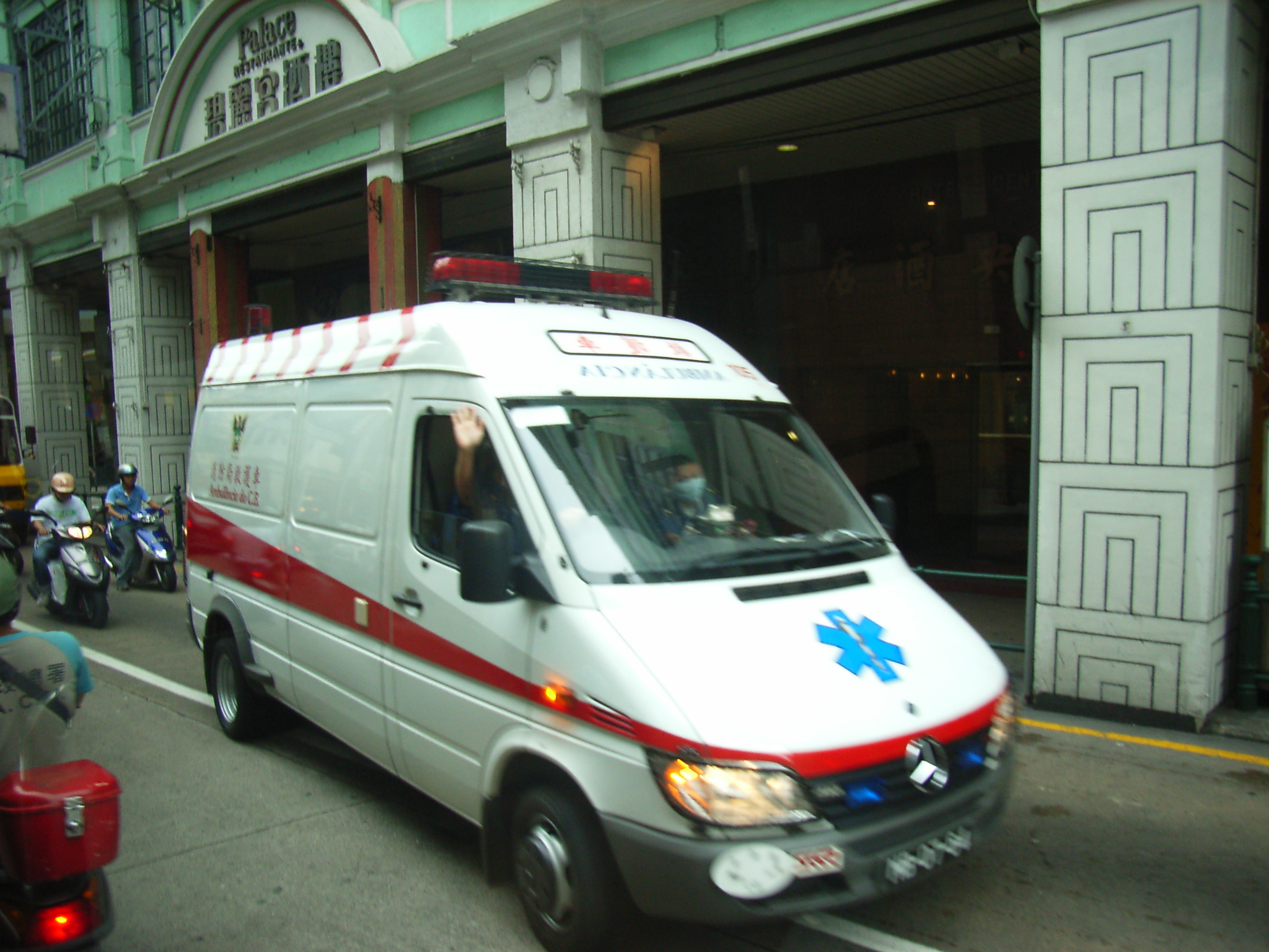 Macau vehicles 澳門的陸上交通工具